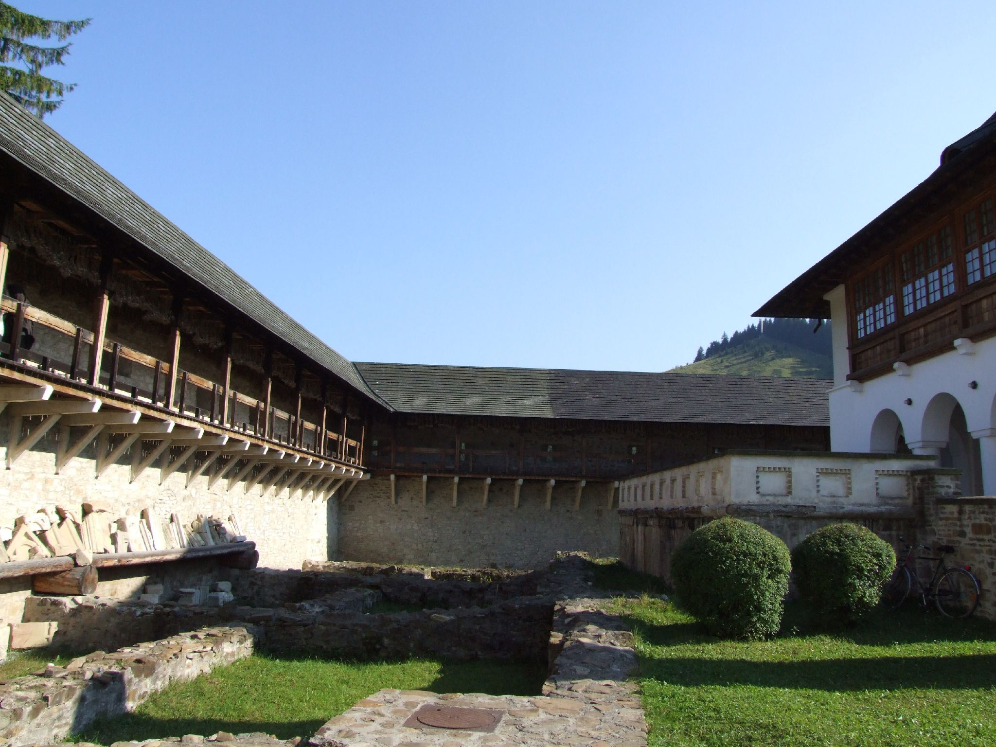 Putna -16.08.2007